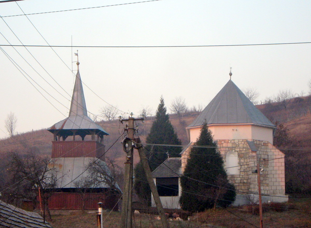 Мужієво. Костел з дзвіницею